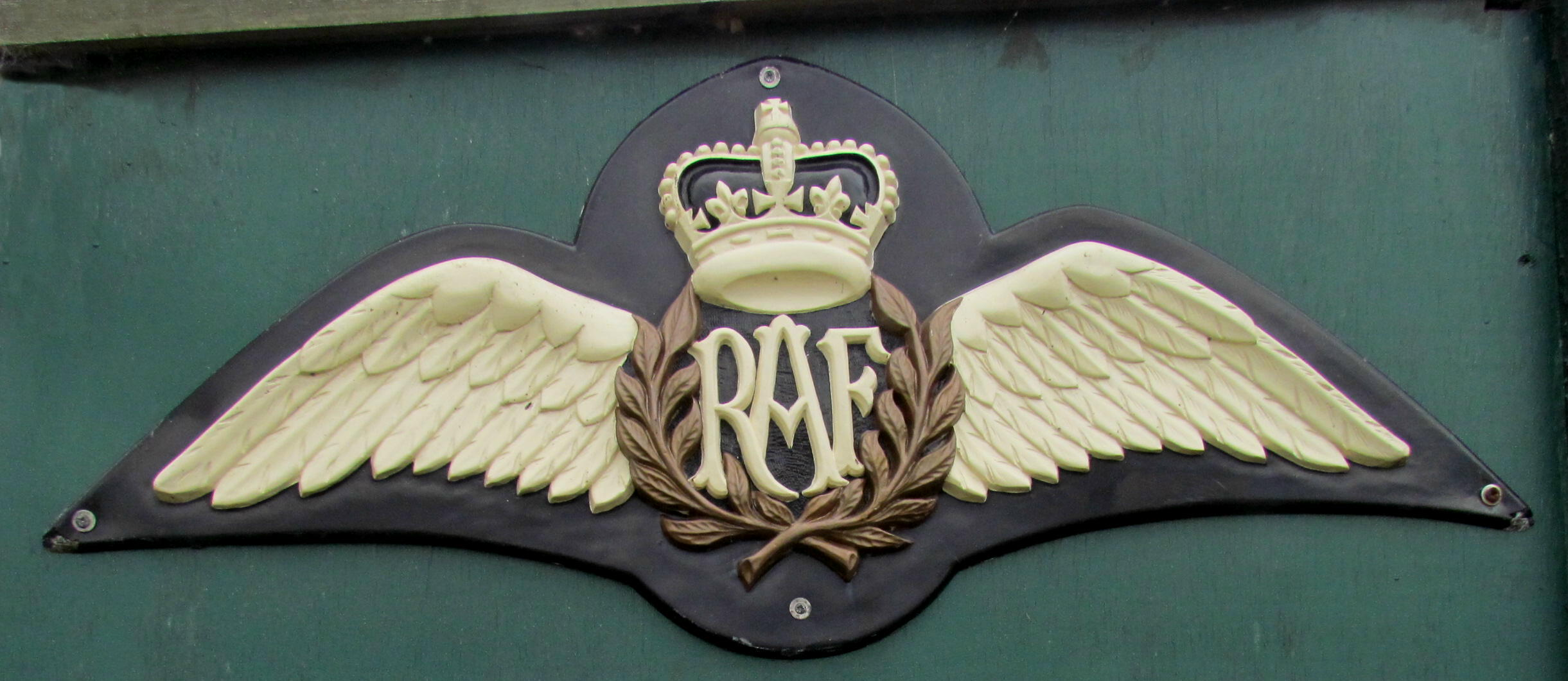 RAF